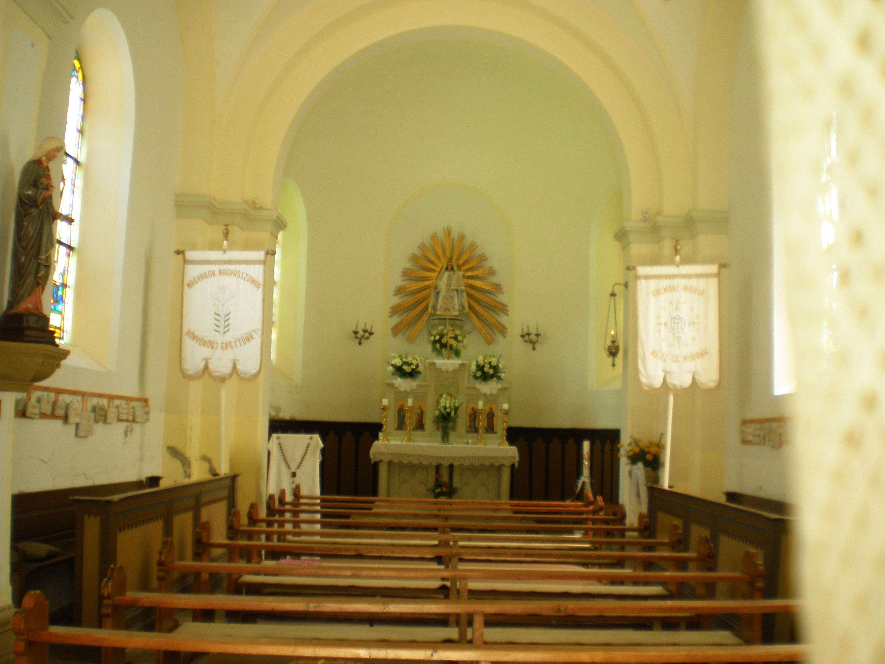 A Sarlós Boldogasszony-kegykápolna belülről Máriakálnokon (Győr-Moson-Sopron megye, Magyarország)